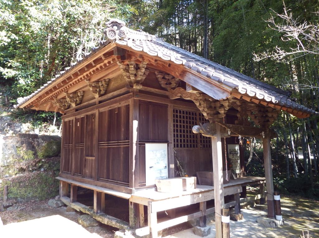 月山神社の大師堂